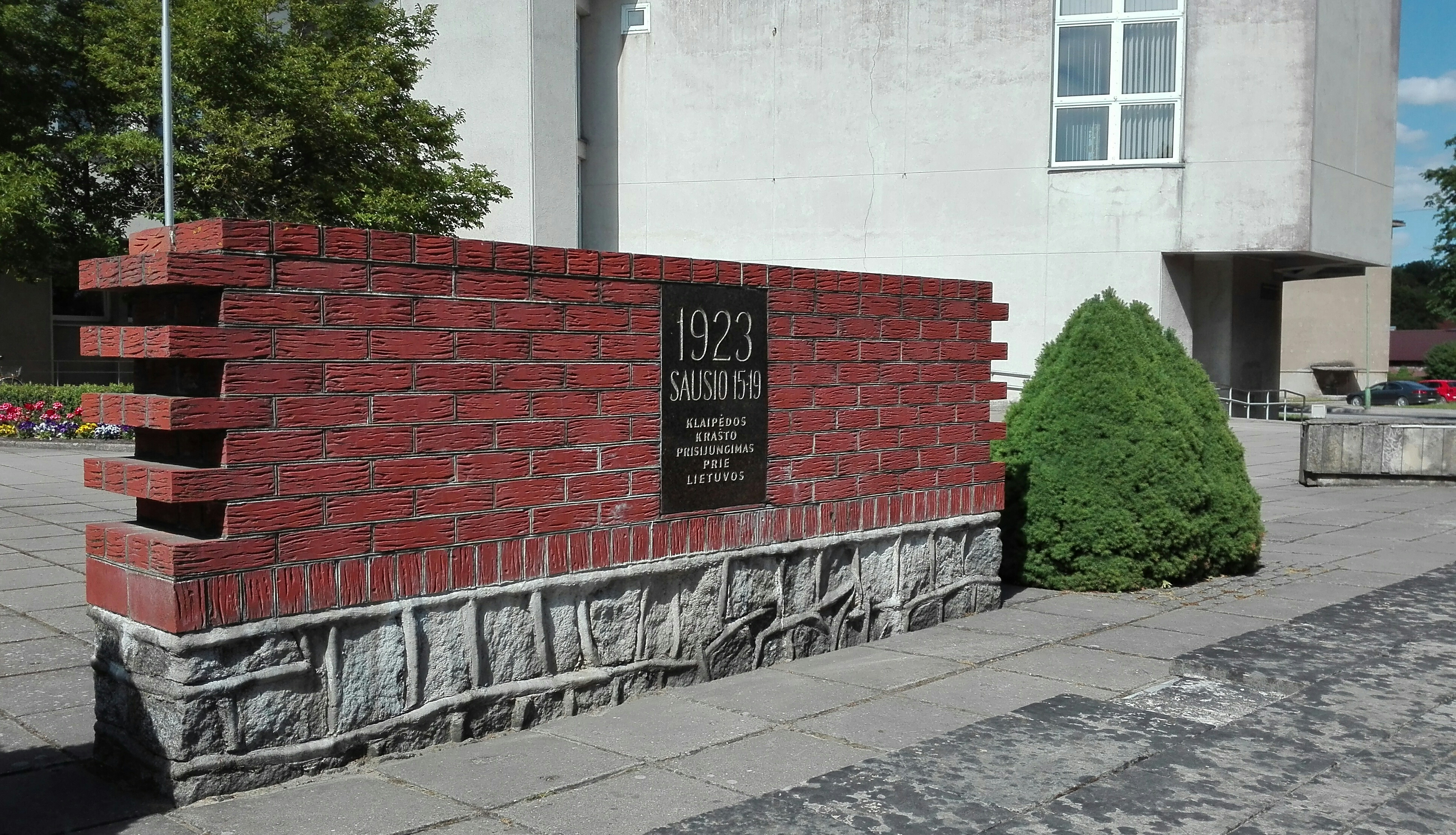 Paminklas Klaipėdos krašto prijungimui prie Lietuvos - Šilutėje